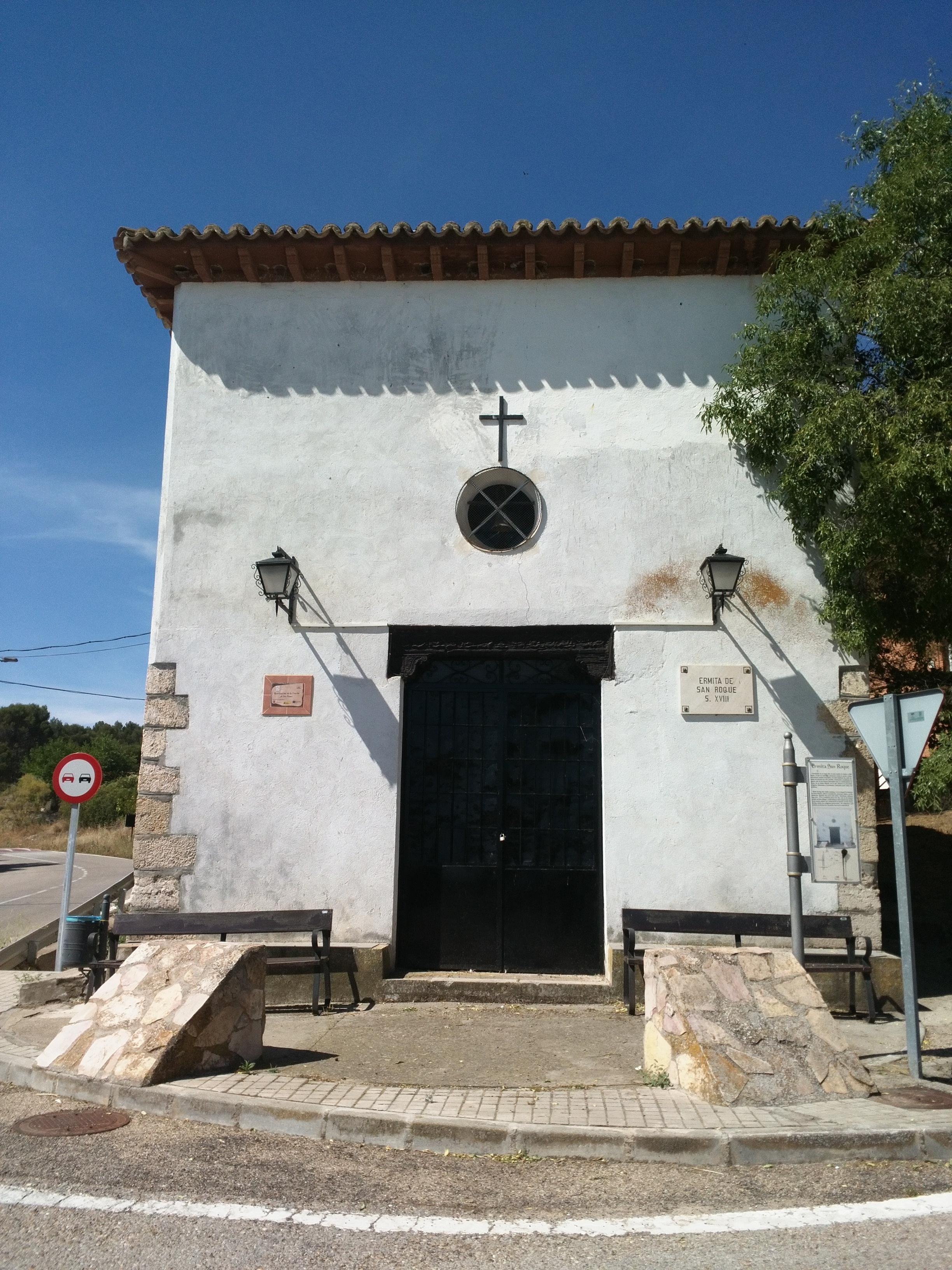 Ermita de San Roque en Brea de Tajo, vista frontal